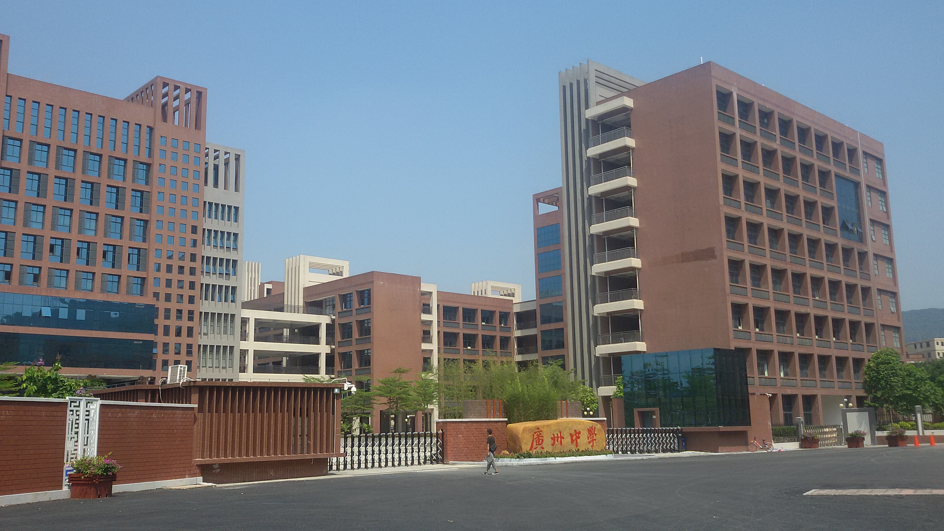 粵語: 2017年9月1號嘅廣州中學，嗰日咁啱正式開學。